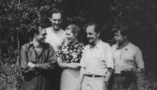 Н.В. Лучник, Н.А. Порядкова и Л.С. Царапкин, которые слушают В.И. Корогодина. Справа стоит О.В. Малиновский, который приехал вместе с Корогодиным в Миассово на Тимофеевскую школу.